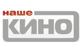 Logo